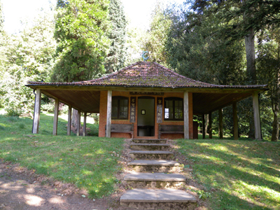 batsford pavillion